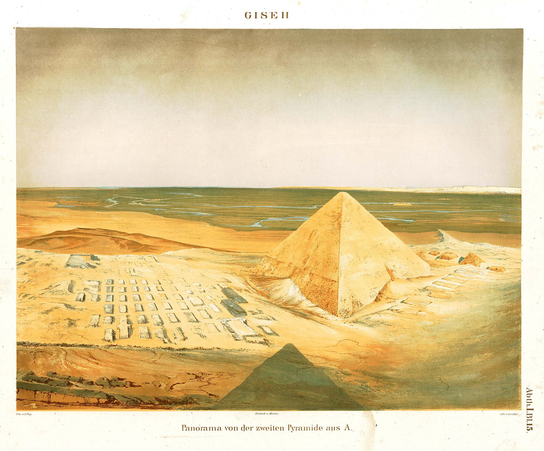 Denkmaeler aus Aegypten und Aethiopien nach den Zeichnungen der von Seiner Majestät dem Koenige von Preussen, Friedrich Wilhelm IV., nach diesen Ländern gesendeten, und in den Jahren 1842–1845 ausgeführten wissenschaftlichen Expedition auf Befehl Seiner Majestät